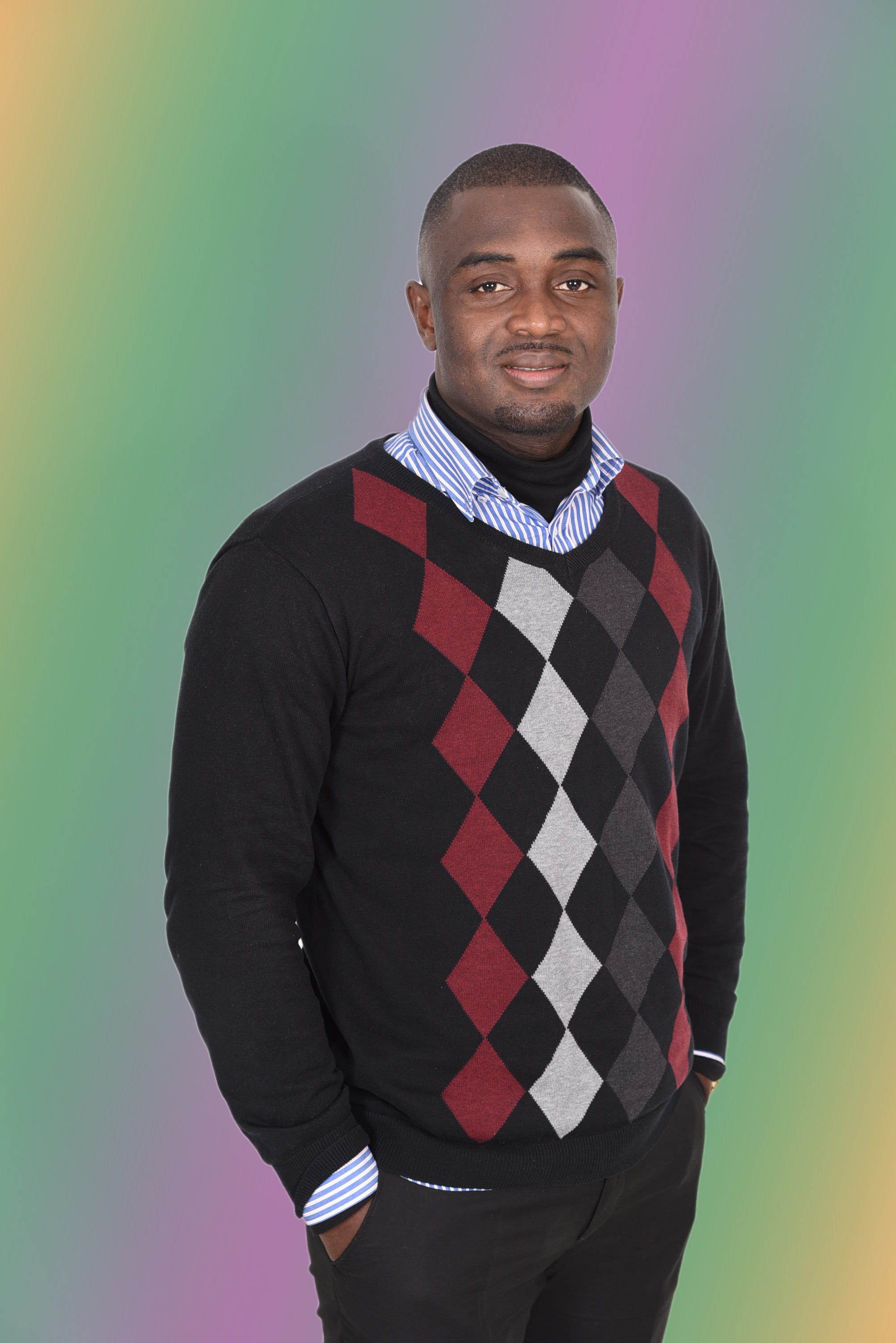 attore